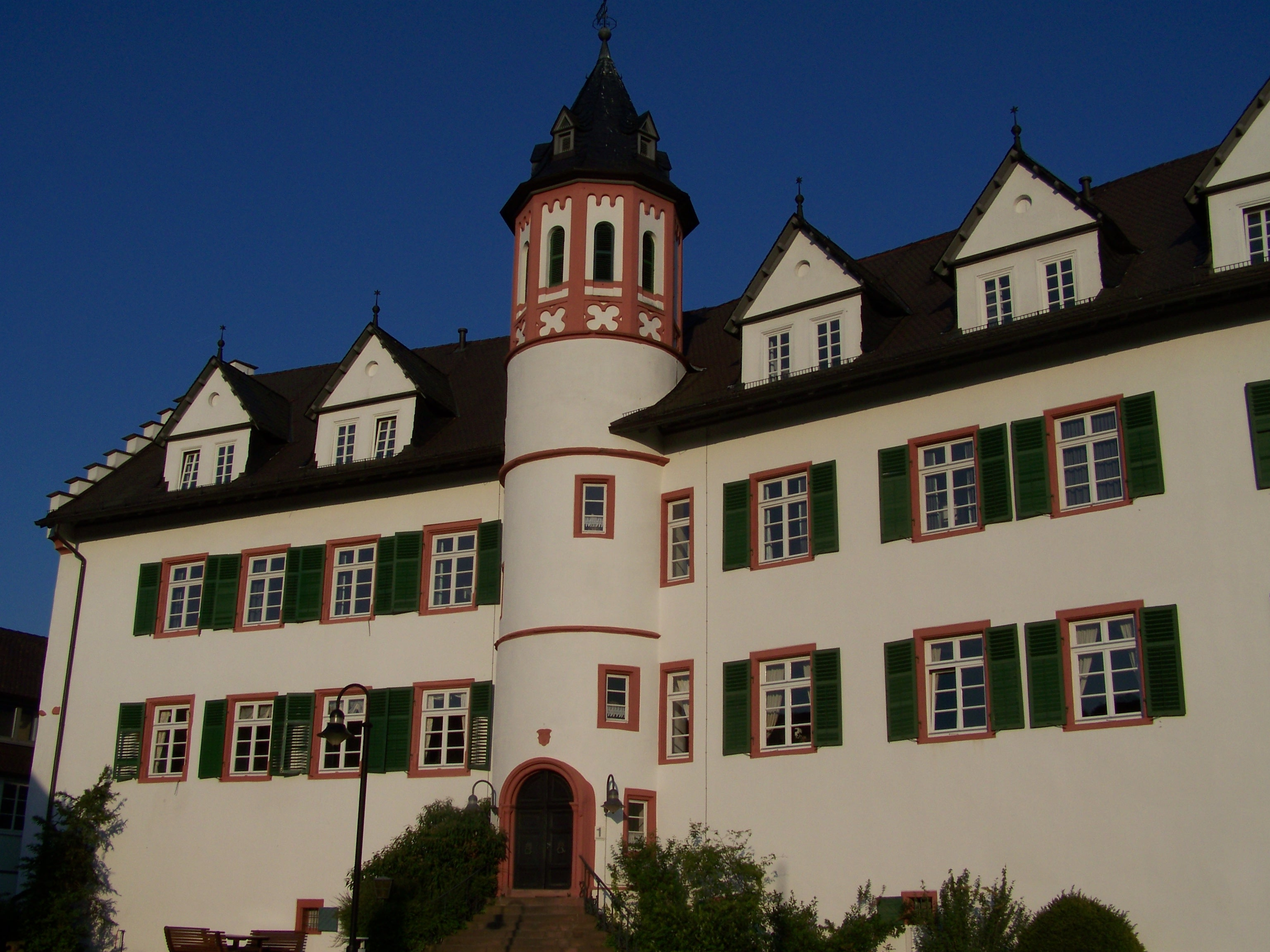 Ansicht von Schloss Schönberg